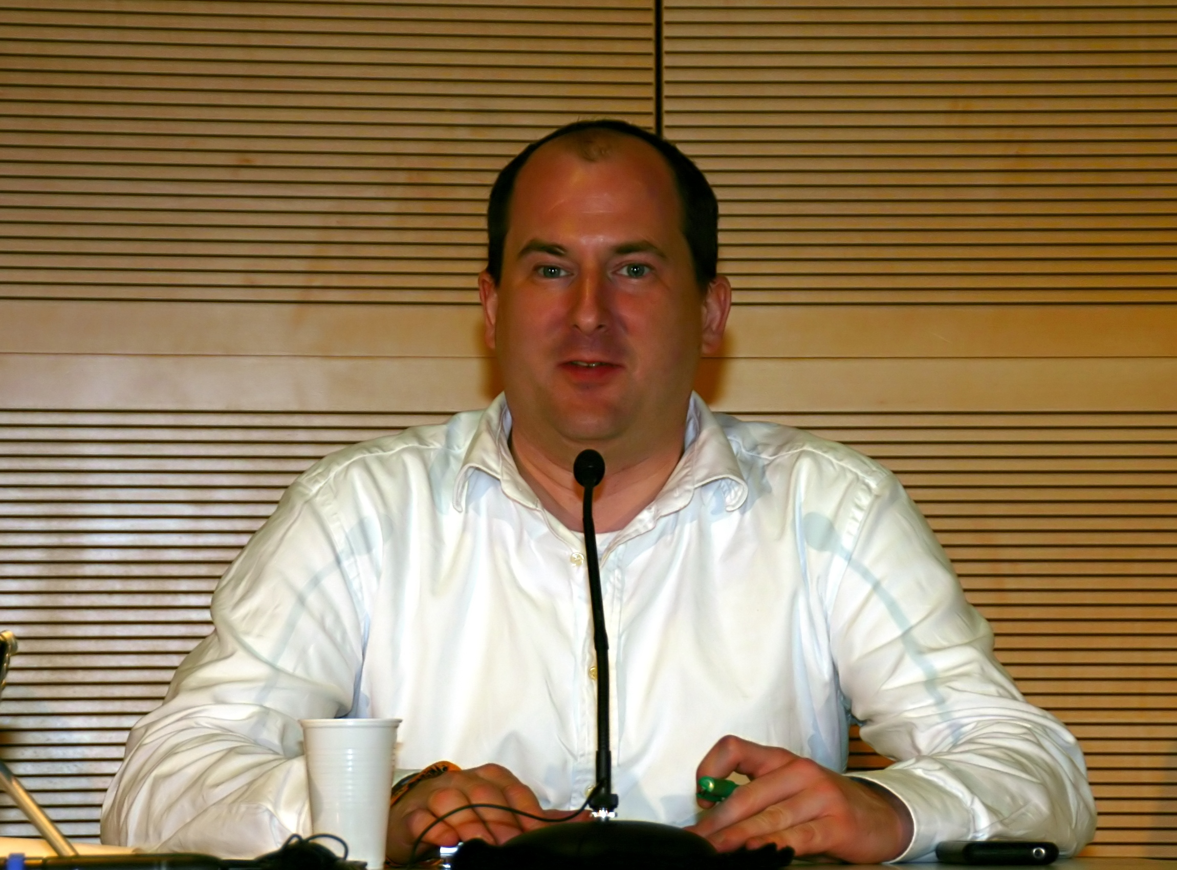 Andy Müller-Maguhn auf der SIGINT Köln 2009: „Strafverfolgung 2.0 statt mittelalterlicher Pranger - Der Fall Tauss als Lehrstück sozialer Exekution mit (neuen) Medien“